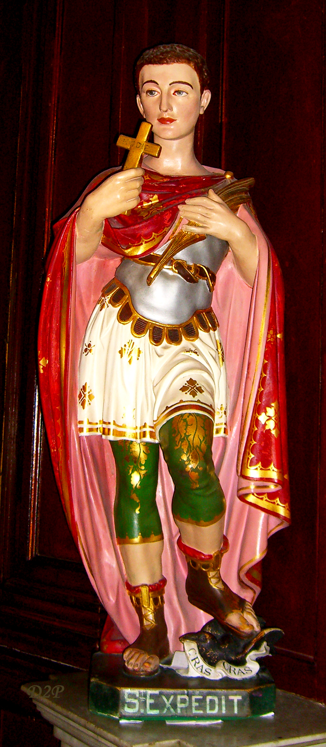 Statue de Saint-Expédit en la cathédrale Notre Dame de la Seds à Toulon (France - Var)